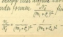 The Rydberg formula as presented to Matematiskt-Fysiska förening.